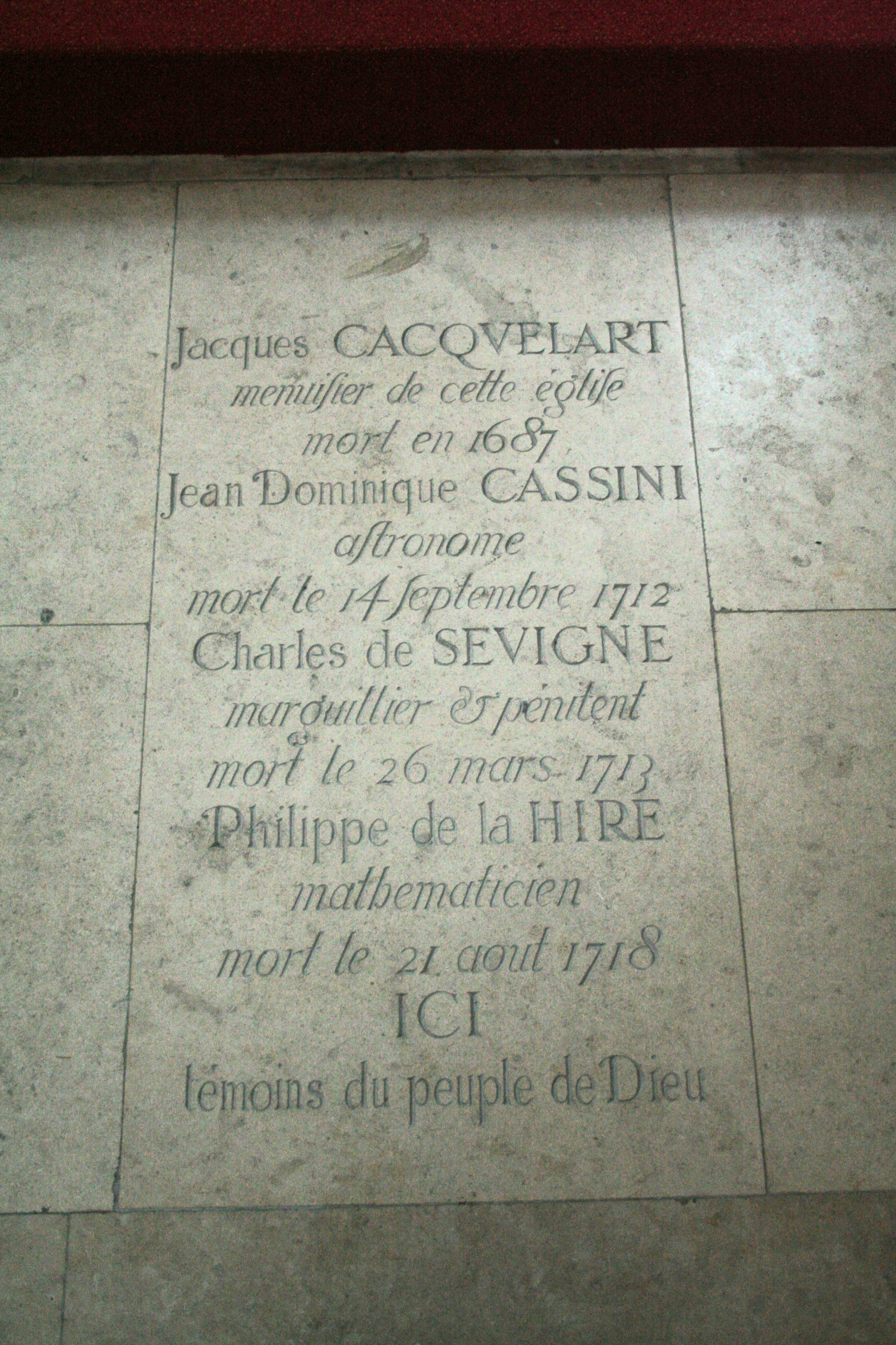 pierre tombale de Jacques Cacquelart, Jean-Dominique Cassini I, Charles de Sévigné et Philippe de la Hire dans l'église Saint-Jacques-du-Haut-Pas, à Paris